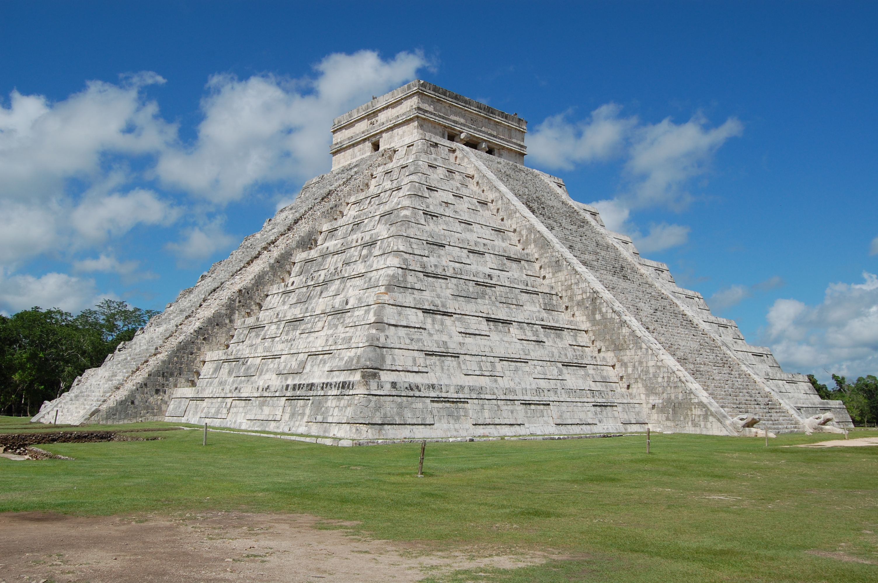 El Castillo o templo de Kukulkan. Chichén Itzá, México. Cultura maya.